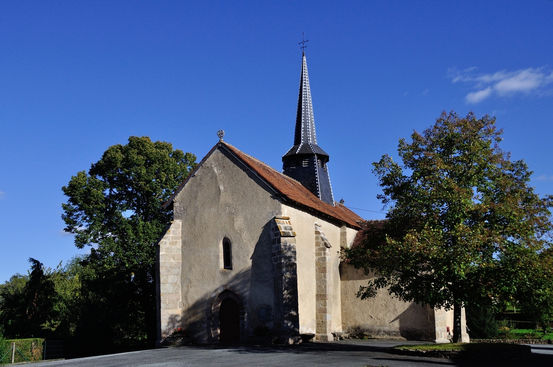 Eglise paroissiale de Saint-Dizier-les-Domaines (Creuse)